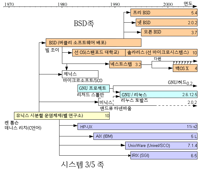 공용의 Unix 계보도의 한글판